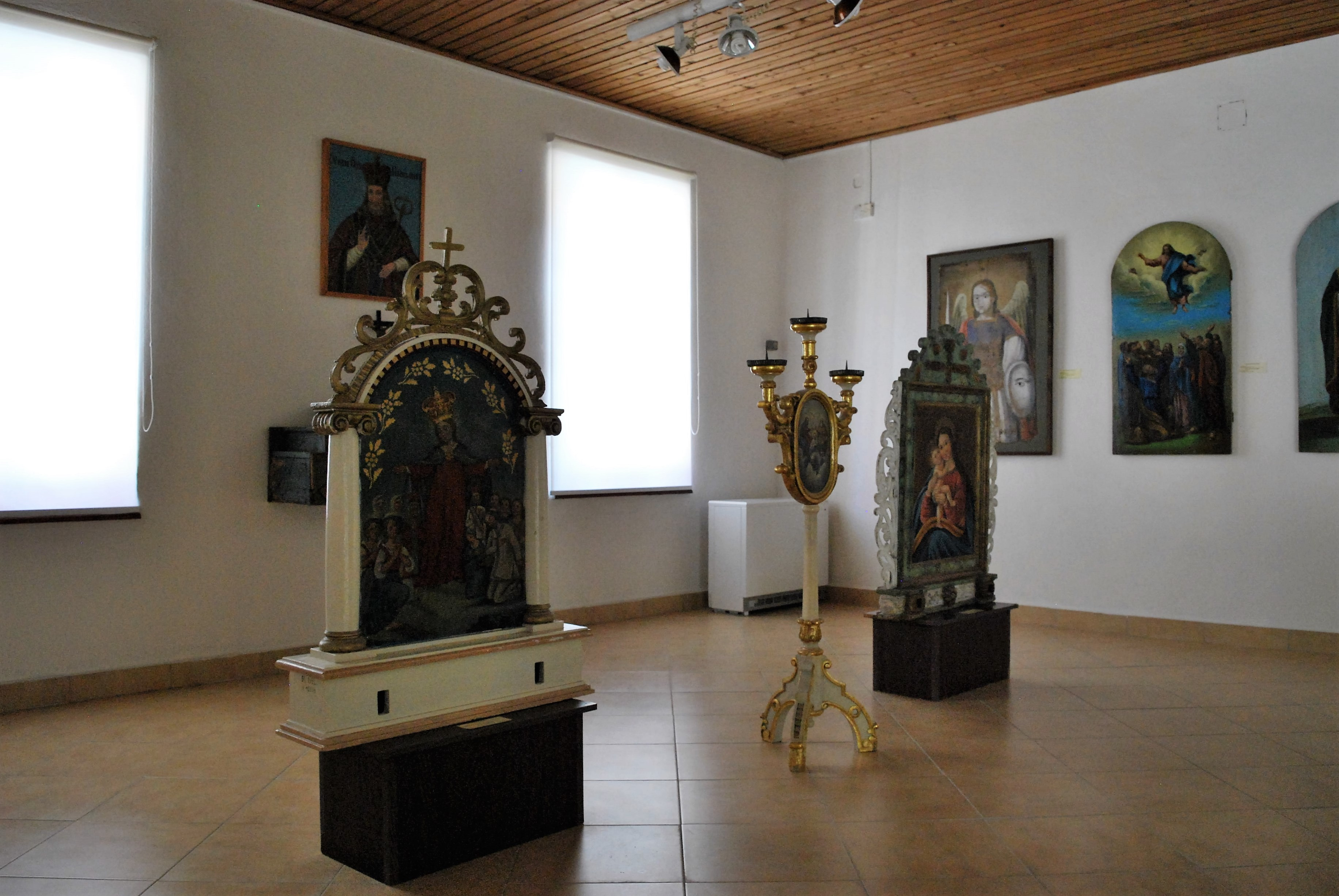 Wystawa ikon w Szaryskim Muzeum w Bardejowie.